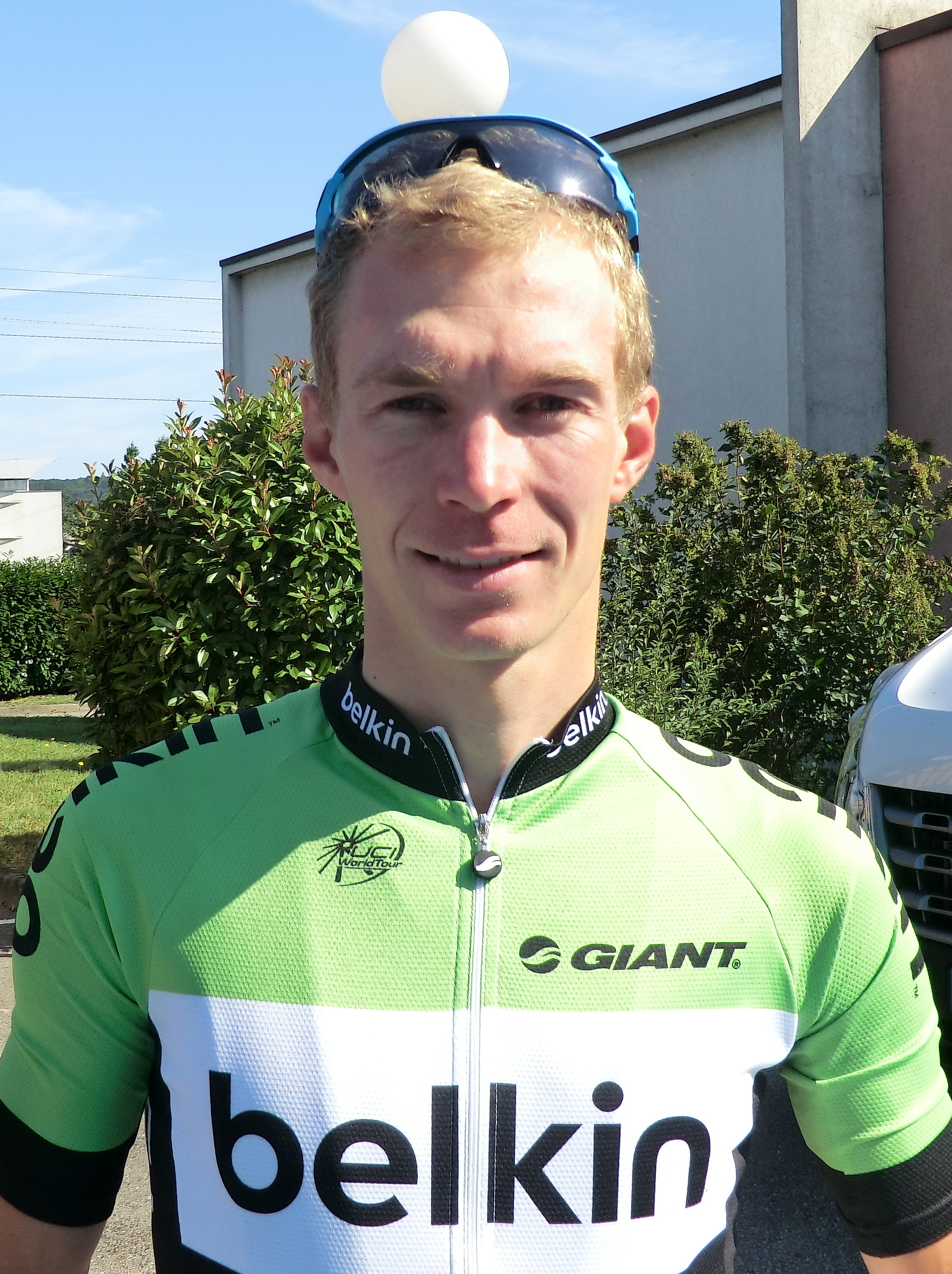 Coureurs à l'échauffement au matin du prologue du tour de l'Ain 2013, à l'hôtel Lyon-Est à Saint-Maurice-de-Beynost.